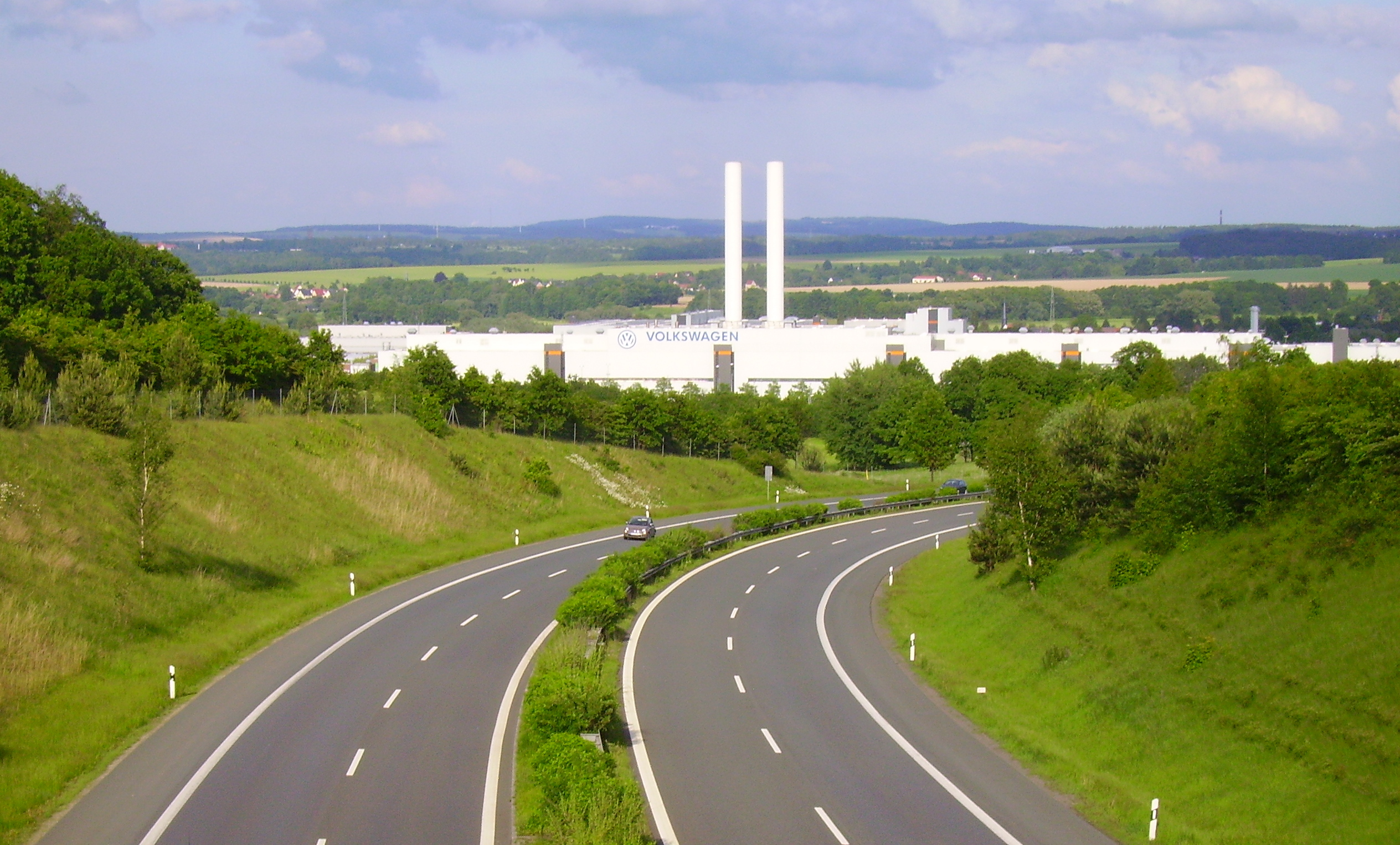 VW - Werk , Zwickau / Mosel